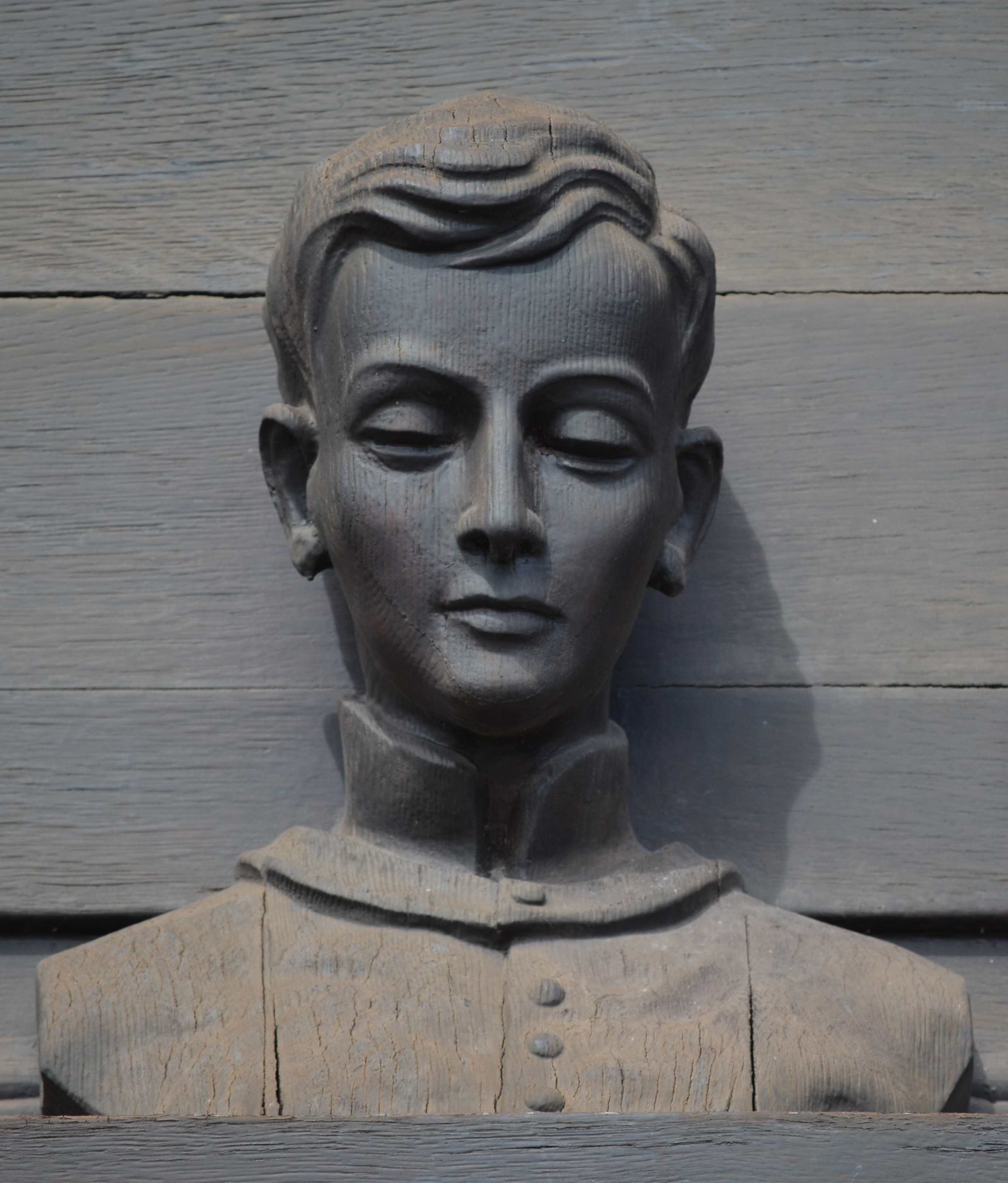 Monceau-sur-Sambre (Charleroi-Belgique) - église Saint-Louis de Gonzague.